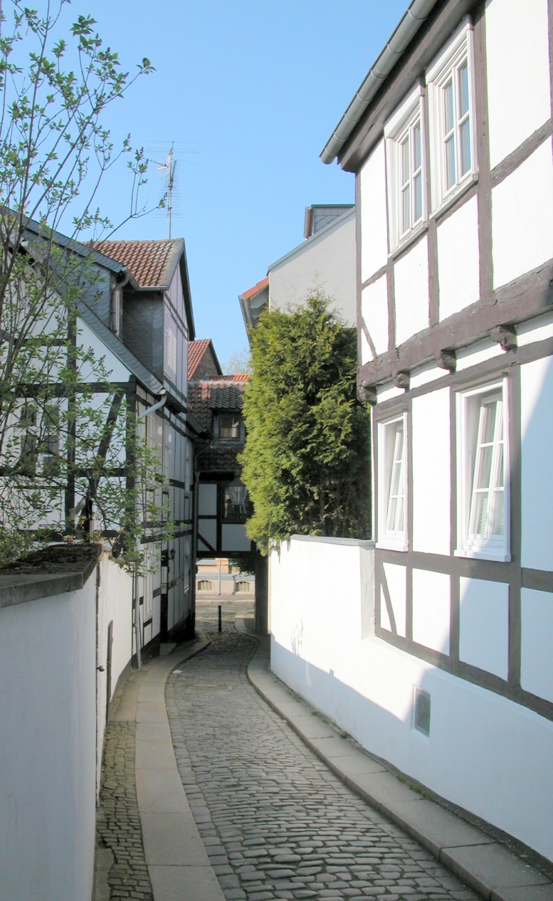 Durchgang von der Aegidienstraße in den Ottilienteil in Braunschweig.